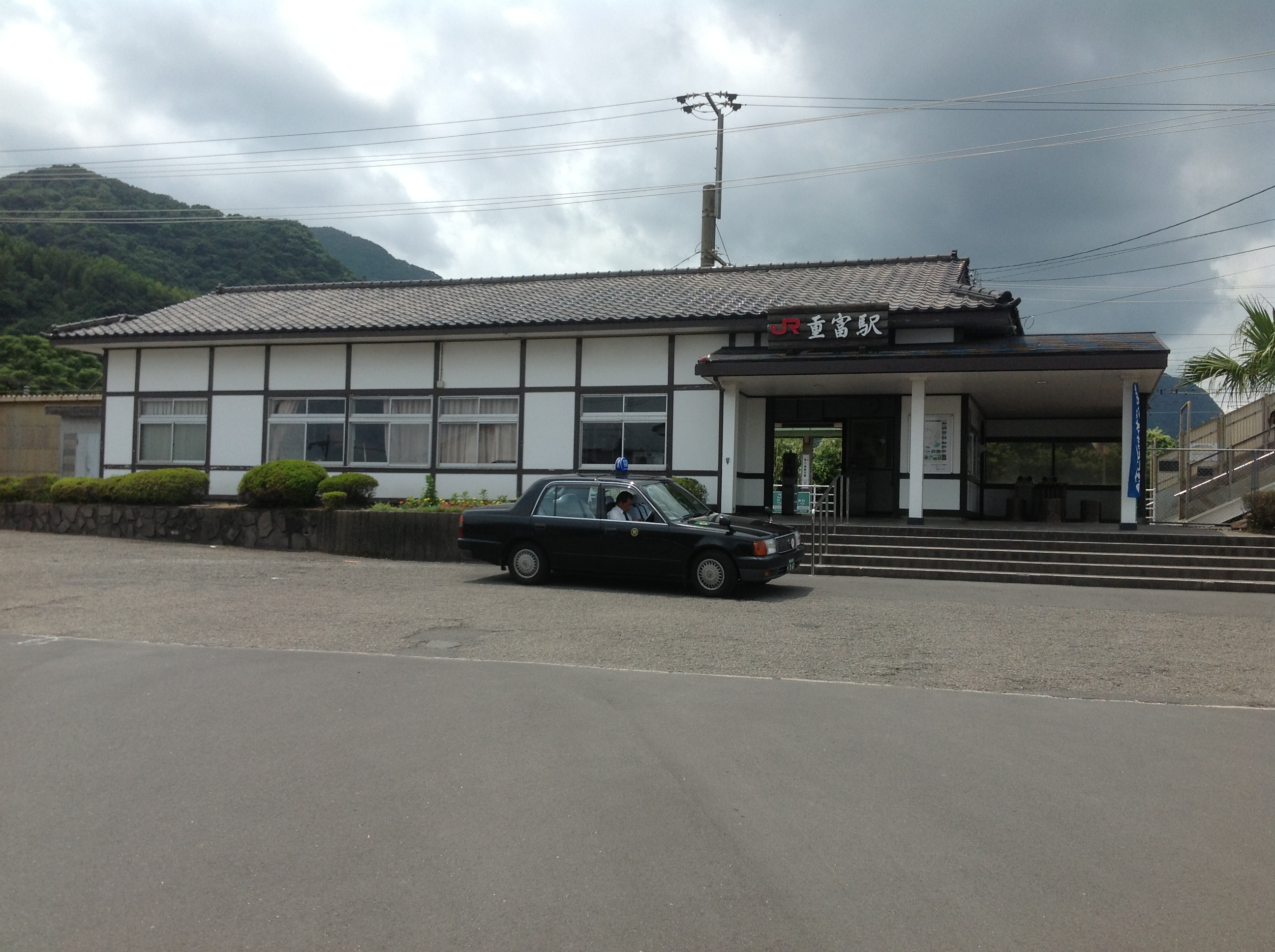 重富駅駅舎（2013/7/27）